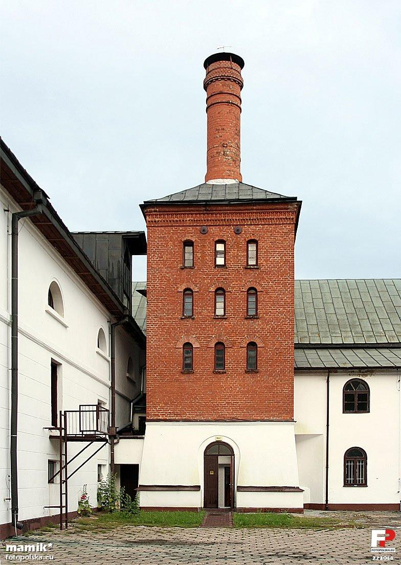 Wieża dawnej słodowni